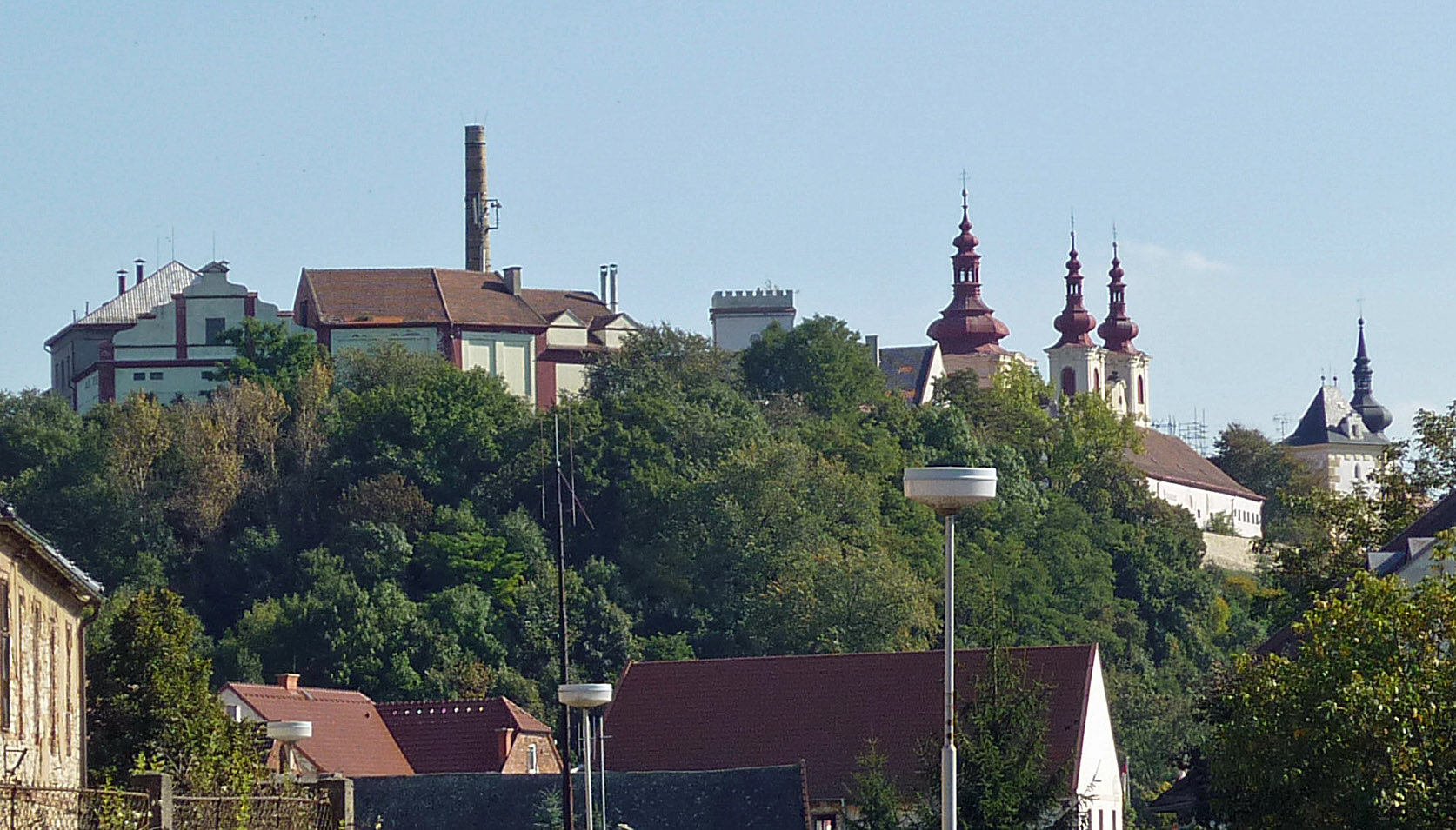 Blick auf die Türme von Saaz